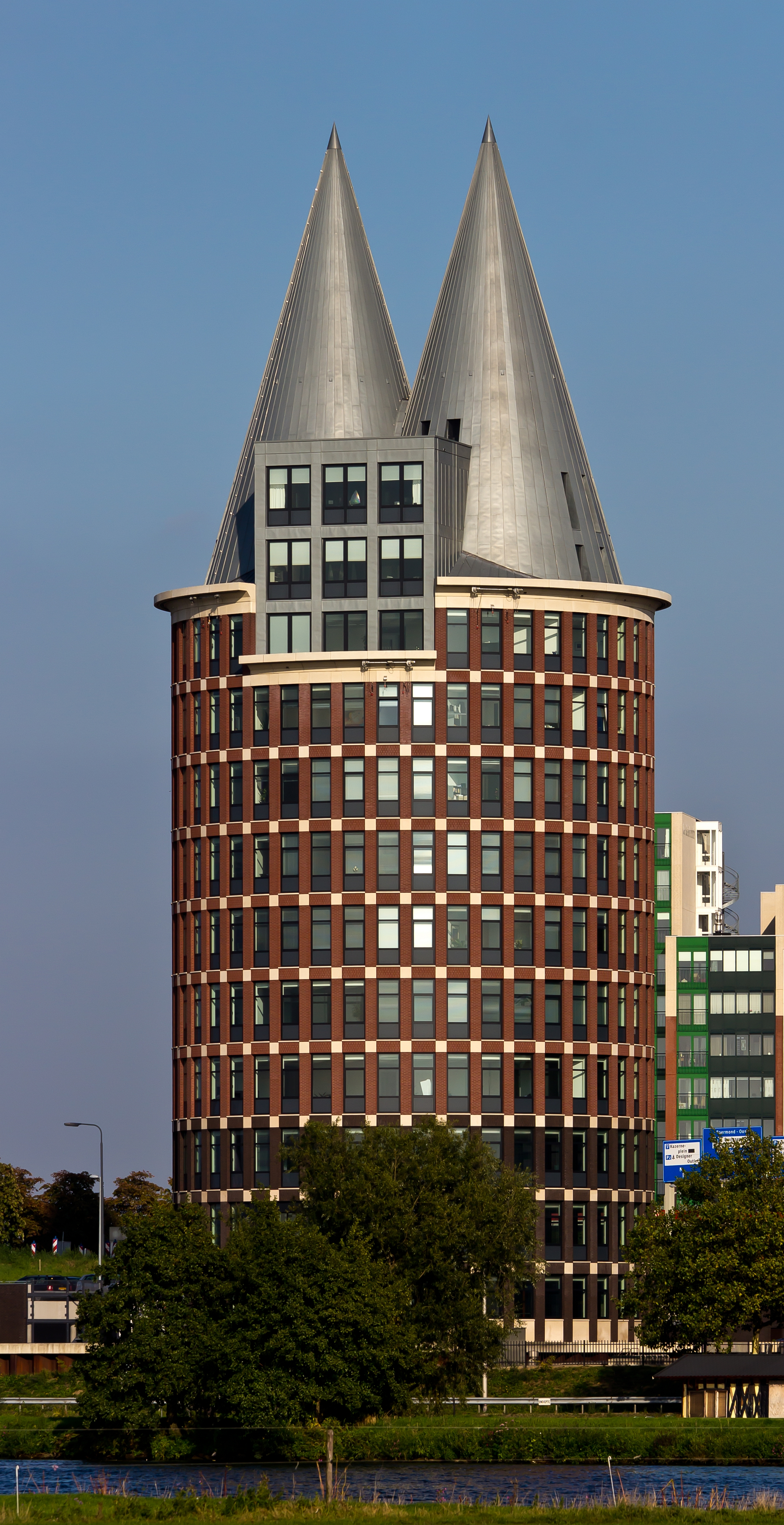 Natalini Toren Roermond